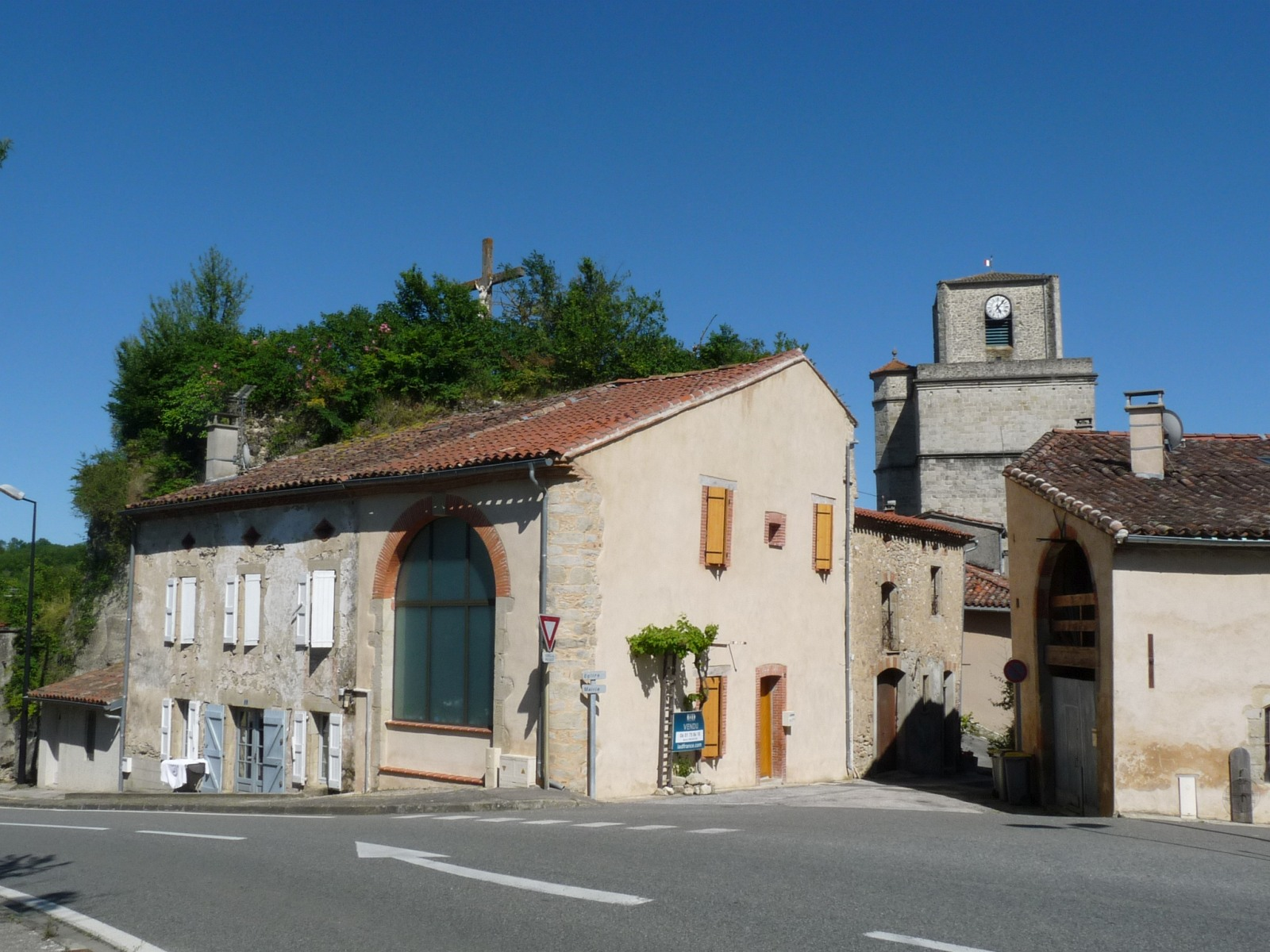 Vue générale du bourg, avec motte de l'ancien château, à gauche. Auriac-sur-Vendinelle, Haute-Garonne, France